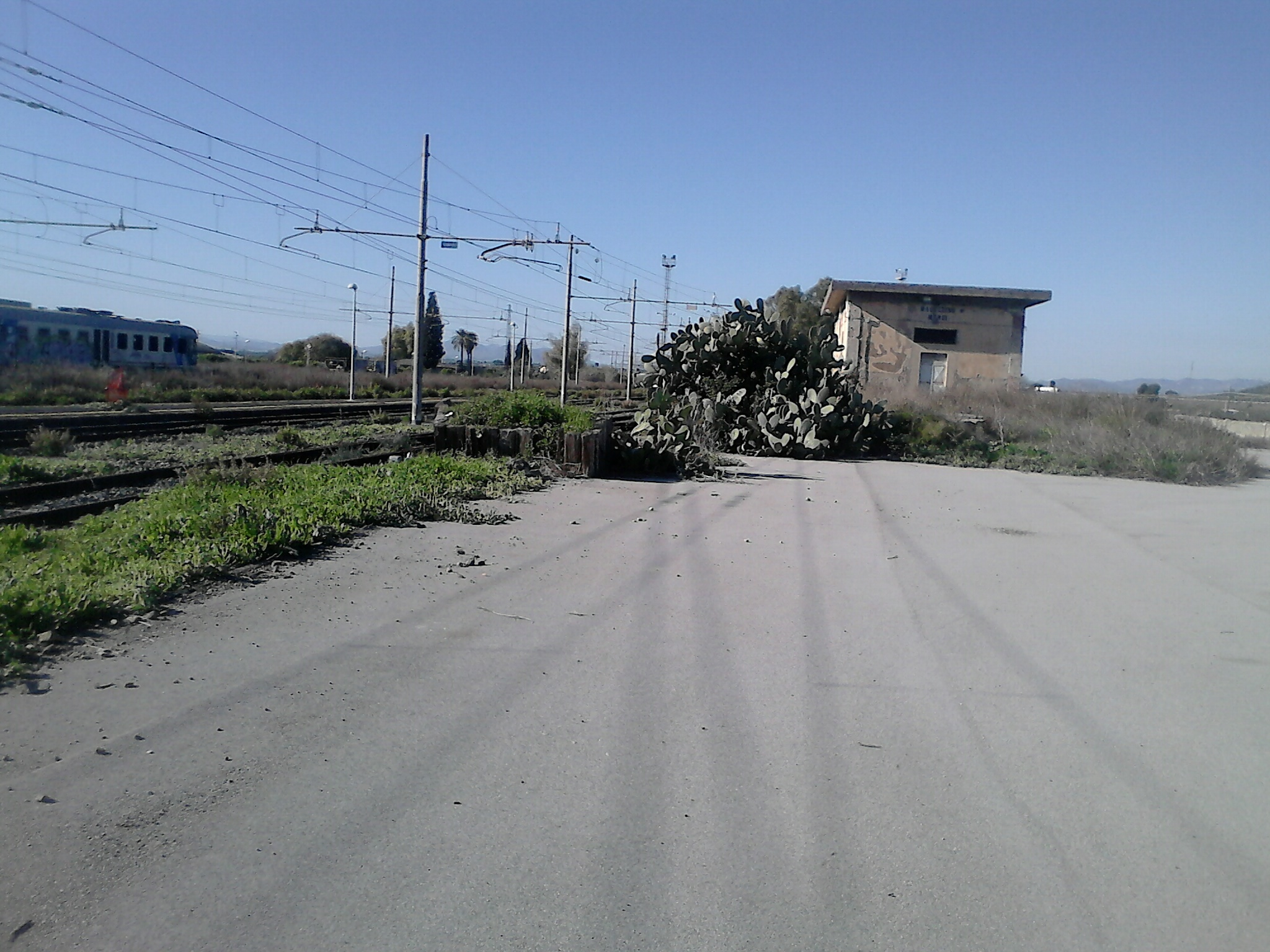 Stazione di Motta Sant'Anastasia, vista del piazzale e magazzino merci